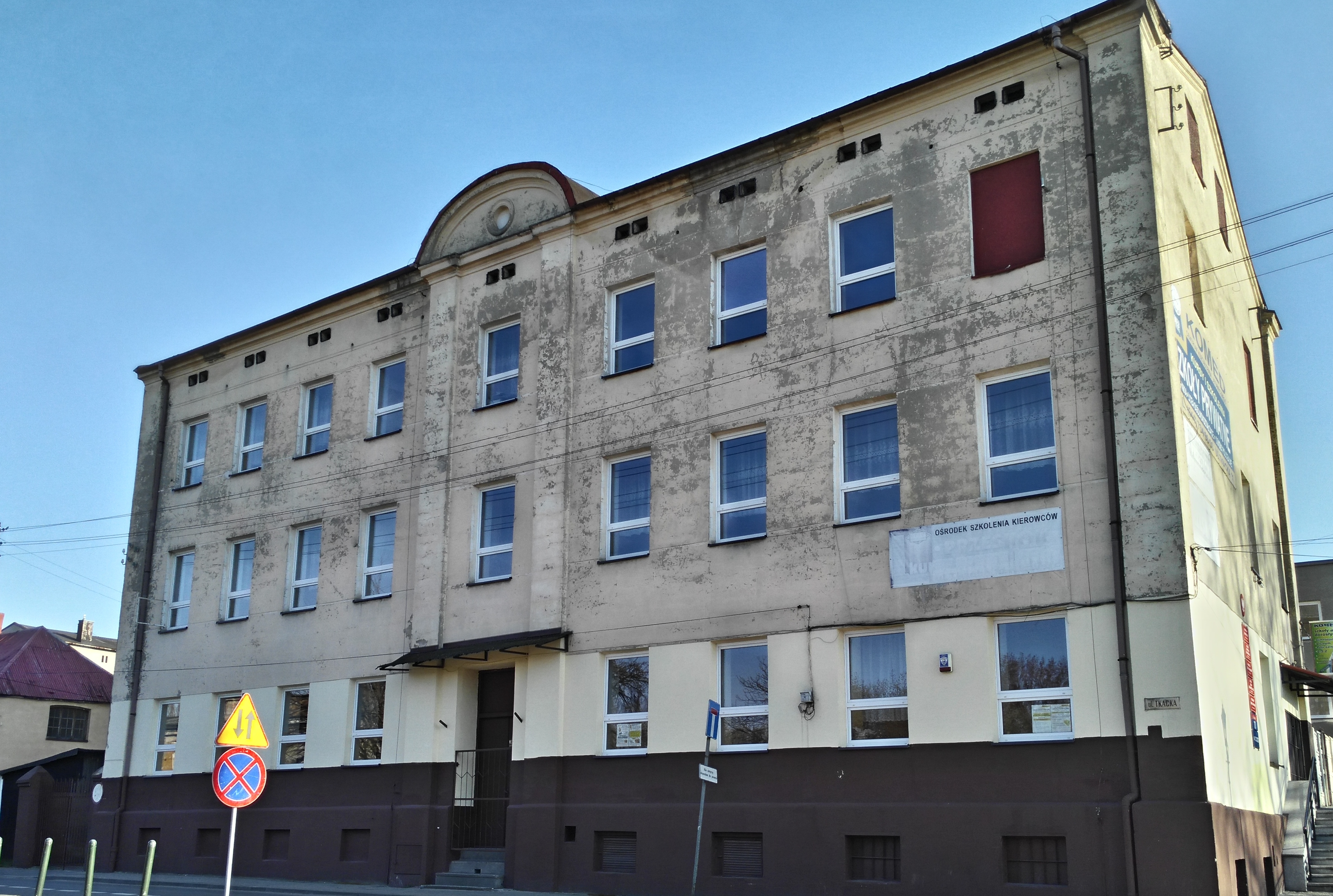 Budynek dawnej szkoly stolarskiej (Zasadnicza Szkoła Zawodowa 5), Róg traktu pieszego Przeskok i ulicy Tkackiej